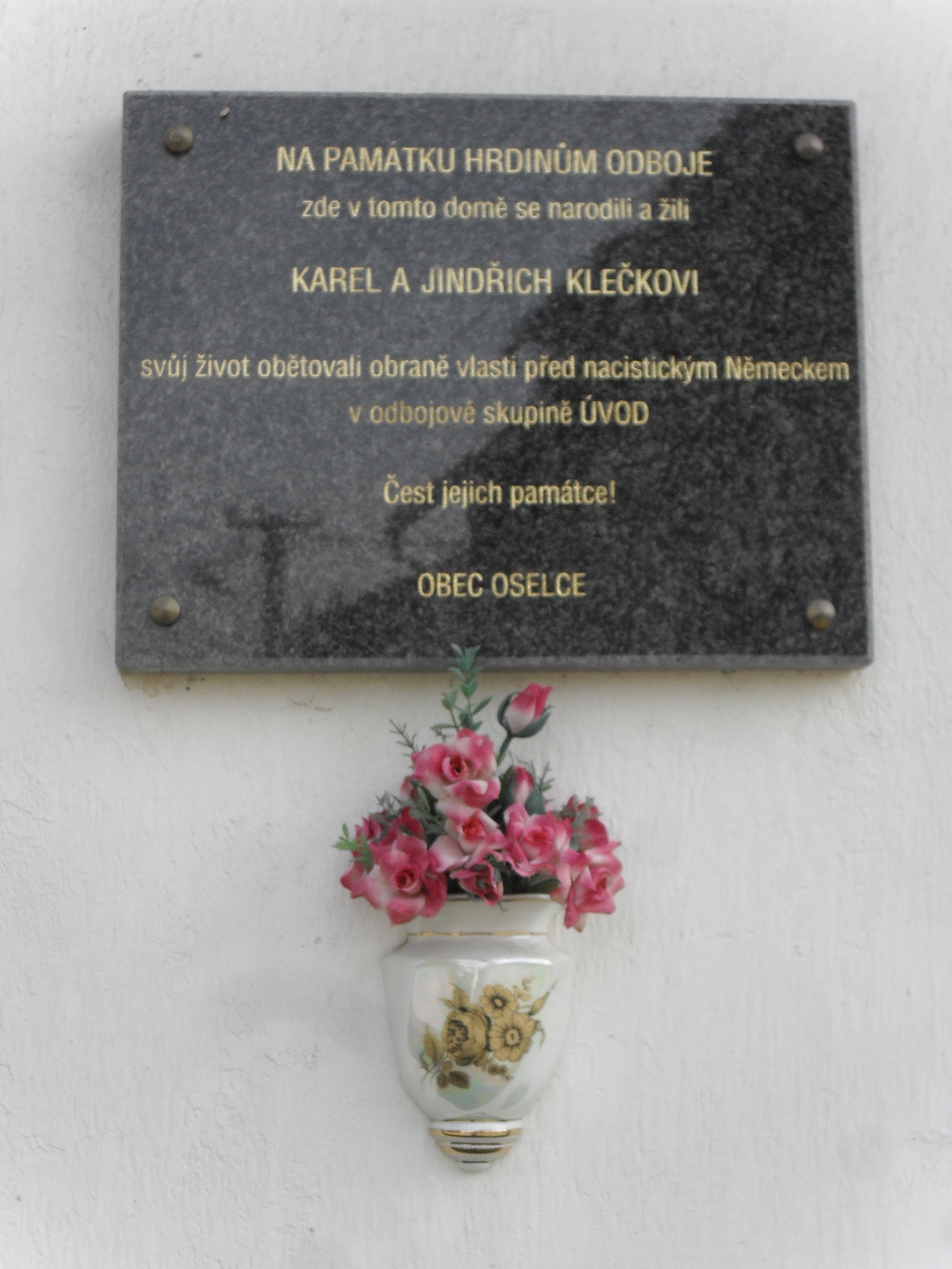 Fotografie pořízena v obci Oselce